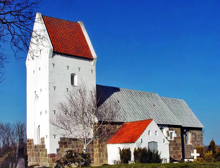 fra sydvest